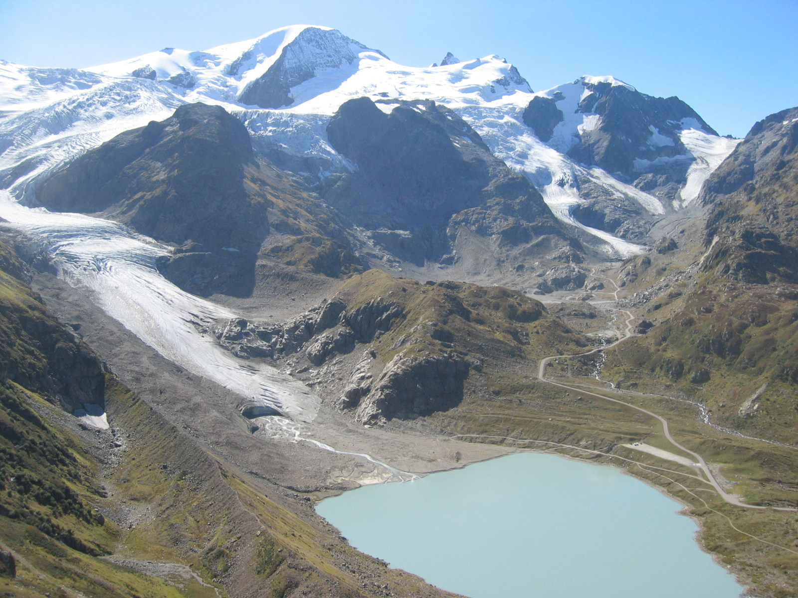 Il Gwächtenhorn (3420 m.) e il lago Steinsee